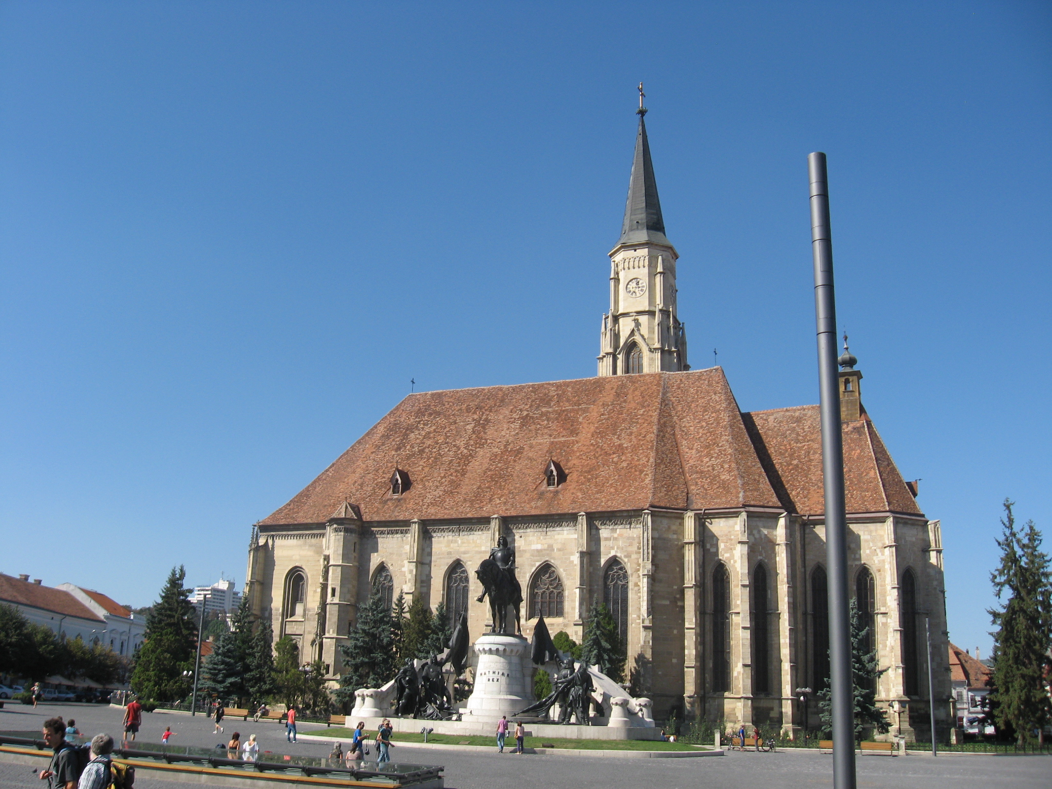 A Fő tér a Mátyás-szoborral és a Szent Mihály-templommal